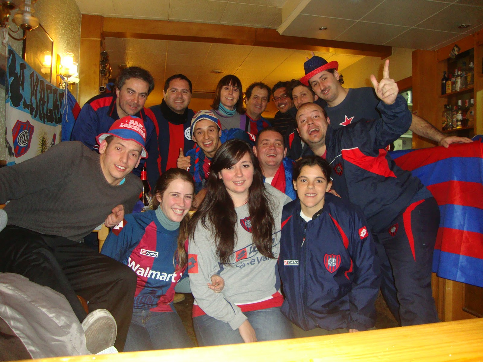 Florencia Quiñones en Barcelona junto a la Peña "Cuervos de Catalunya".